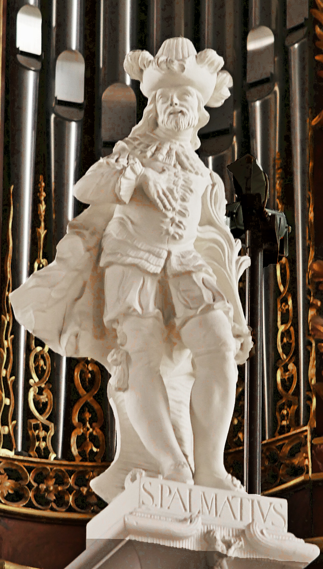 Basilika St. Paulin, Trier, Statue des St. Palmatius an der Orgelempore